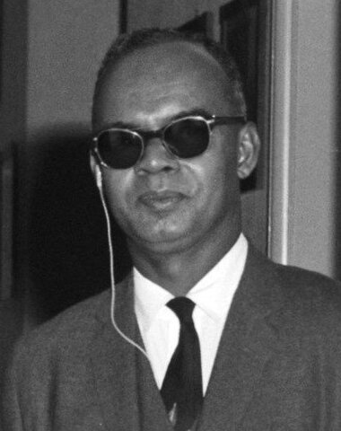 Collectie / Archief : Fotocollectie Anefo Reportage / Serie : [ onbekend ] Beschrijving : Koningin Juliana ontvangt op paleis Soestdijk de premier van Trinidad, Eric Williams Datum : 3 oktober 1962 Locatie : Baarn, Utrecht (provincie) Trefwoorden : koninginnen, ministers-presidenten, paleizen, prinsessen Persoonsnaam : Williams, Eric Instellingsnaam : Paleis Soestdijk Fotograaf : Bilsen, Joop van / Anefo, [onbekend] Auteursrechthebbende : Nationaal Archief Materiaalsoort : Negatief (zwart/wit) Nummer archiefinventaris : bekijk toegang 2.24.01.04 Bestanddeelnummer : 914-3739